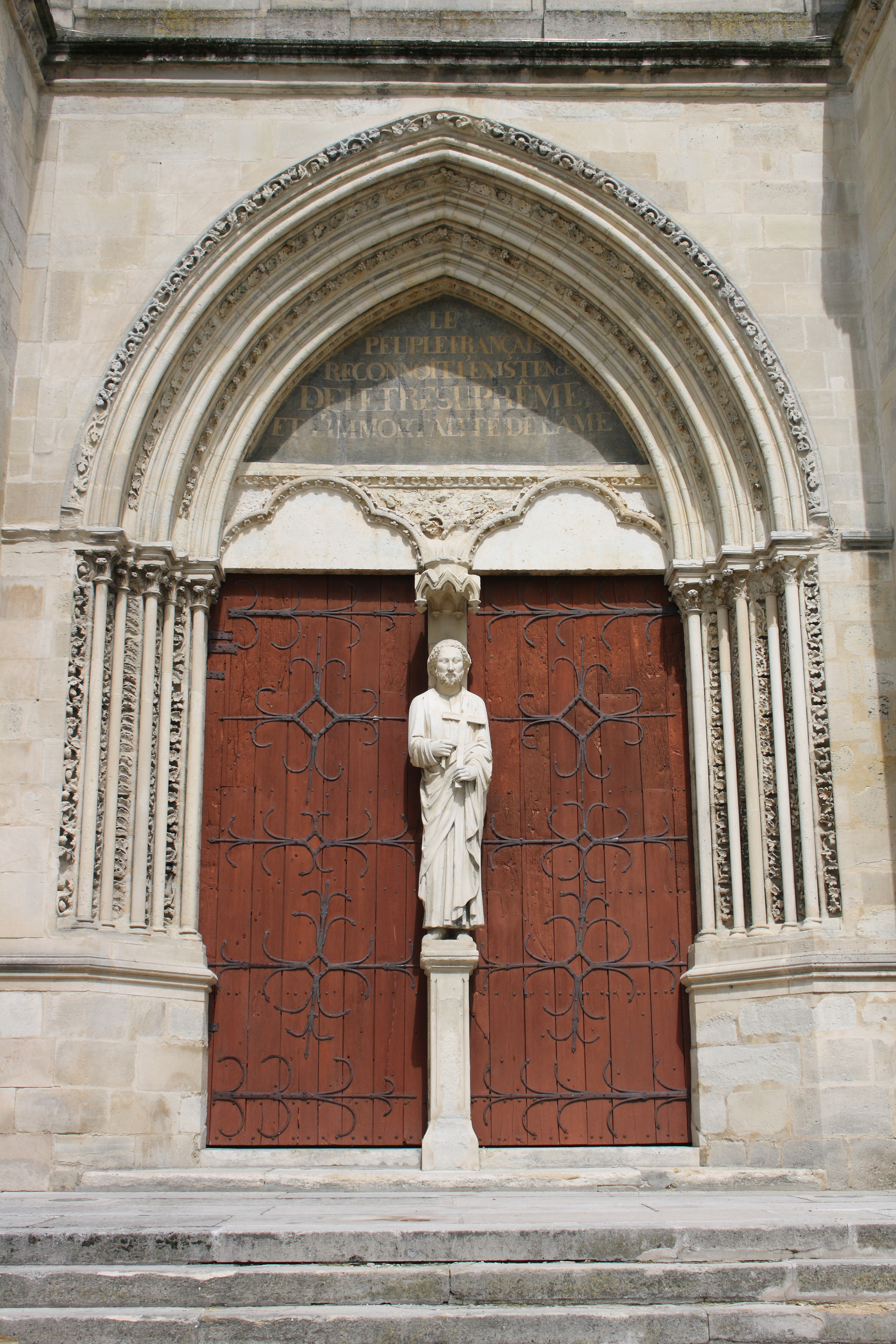 katholische Pfarrkirche Saint-Pierre-Saint-Paul in Gonesse